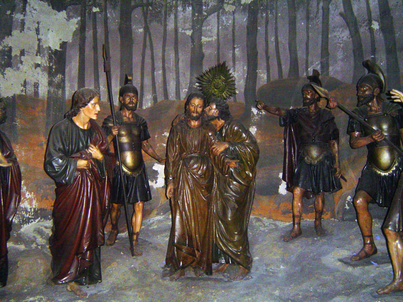 Cenário do "Beijo de Judas" no Bom Jesus em Braga.